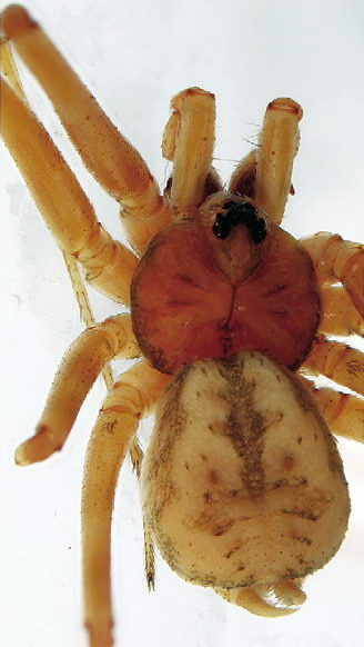 Ovtsharenkoia pallida male